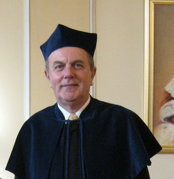 Jerzy Rubach na uroczystości rozdania dyplomów doktorskich, Uniwersytet Warszawski, 2008